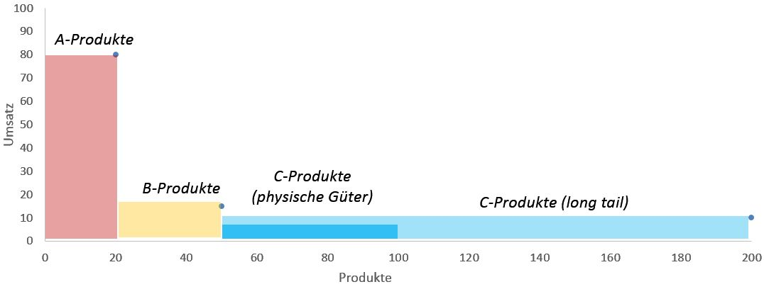 ABC-Produkte bei physischen und virtuellen Gütern (long tail)